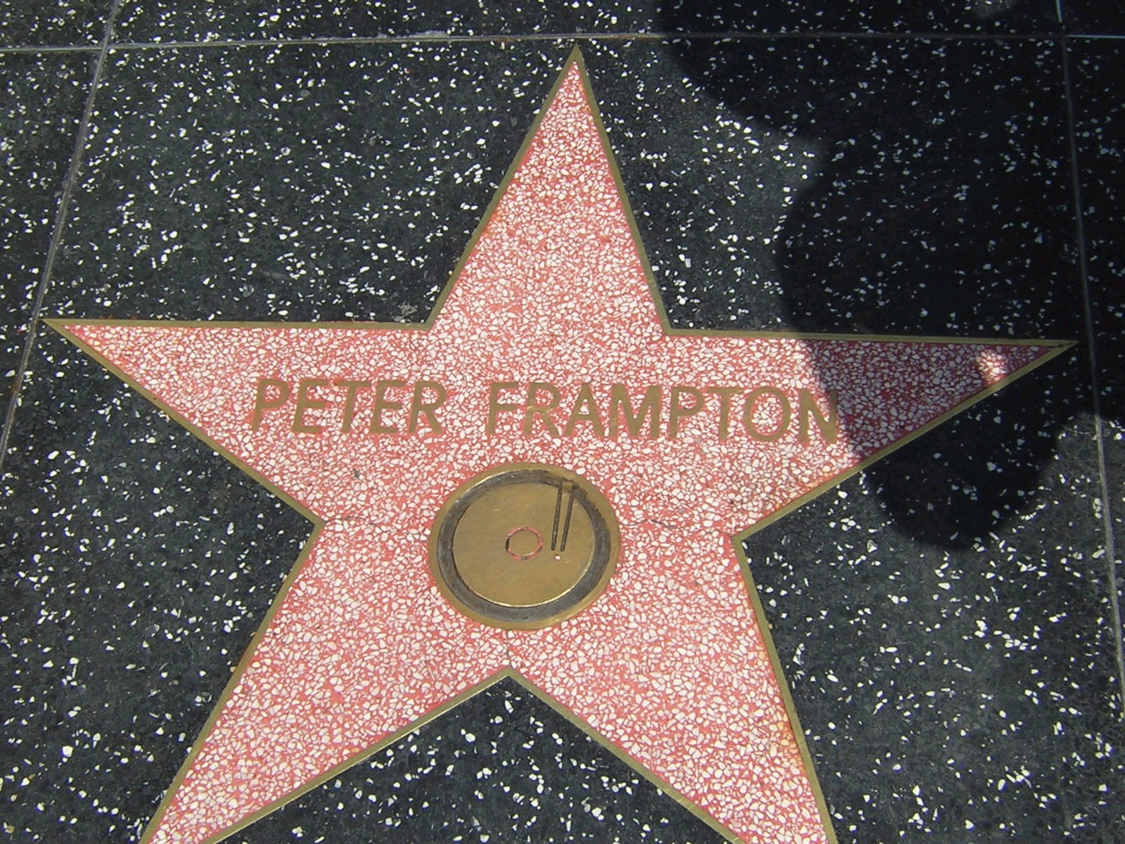 Walk of Fame muss man gesehen haben